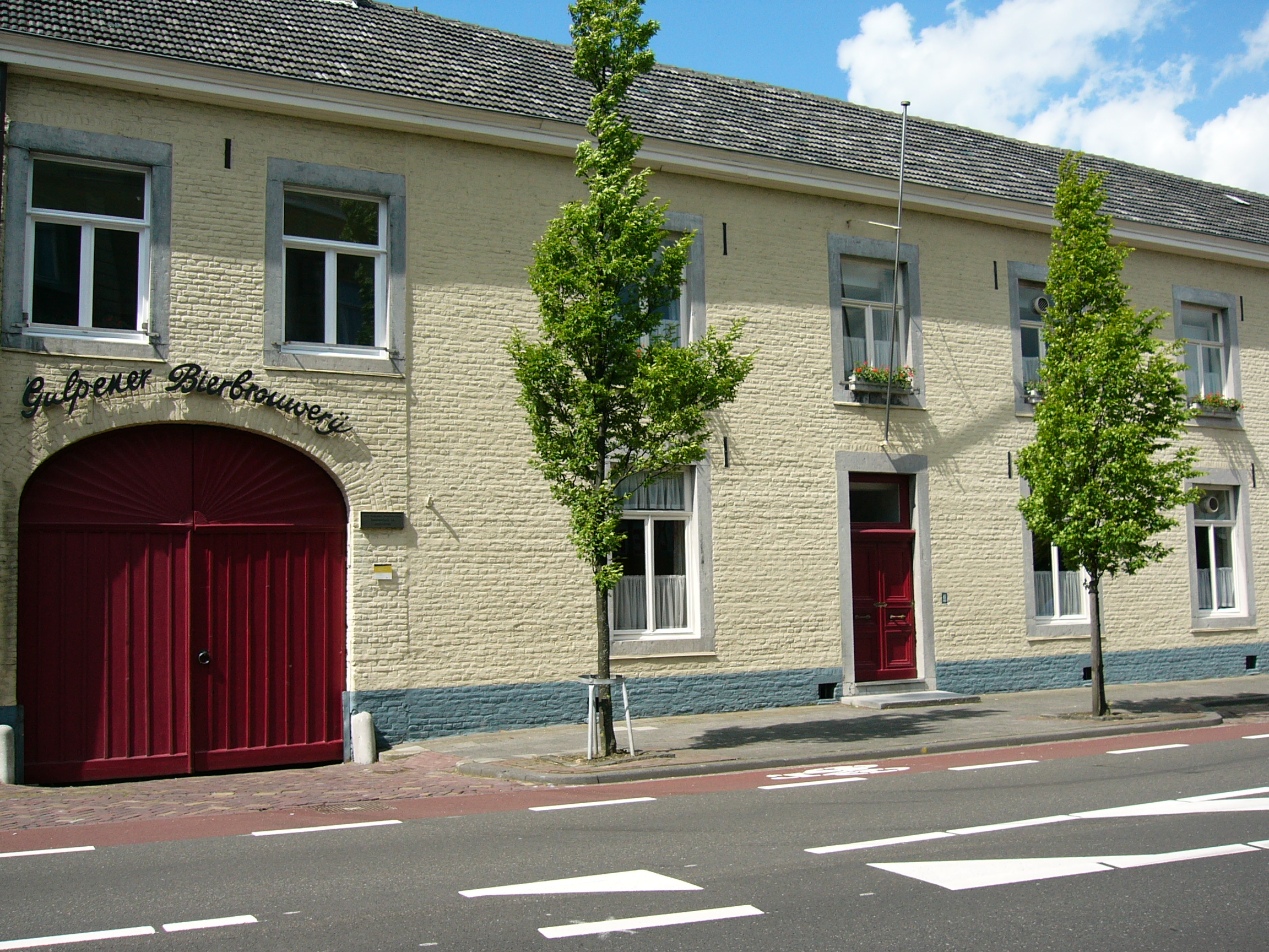 Gulpener Beerbroewerie in Gulpe / Gulpener Bierbrouwerij in Gulpen Foto door Cicero